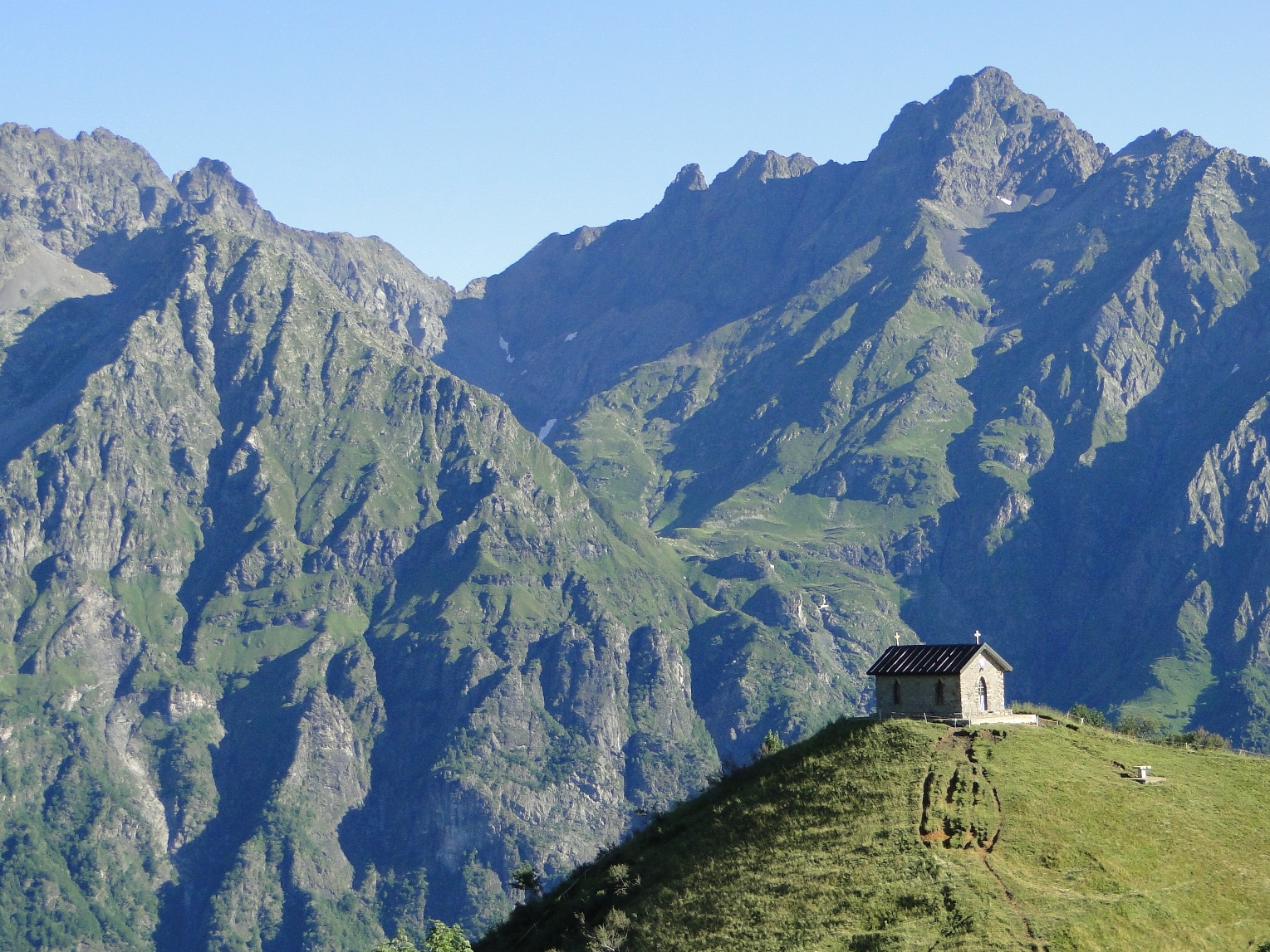 Passo della Manina con Pizzo Coca, Prealpi Orobie, Bergamo